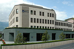 VP Bank in Vaduz